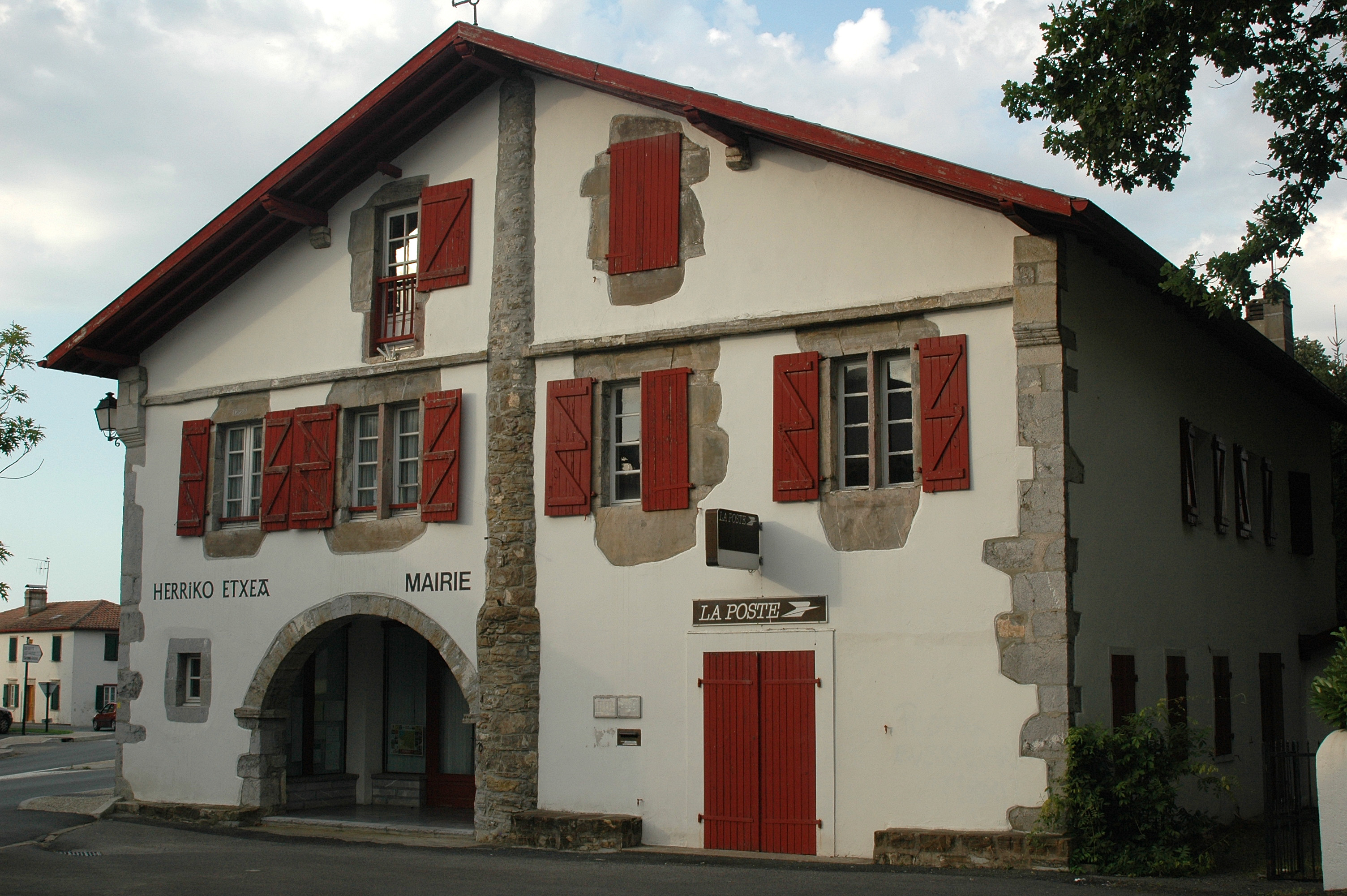 Larressore, la mairie et la poste. Photo prise le 08/08/06 par Harrieta171